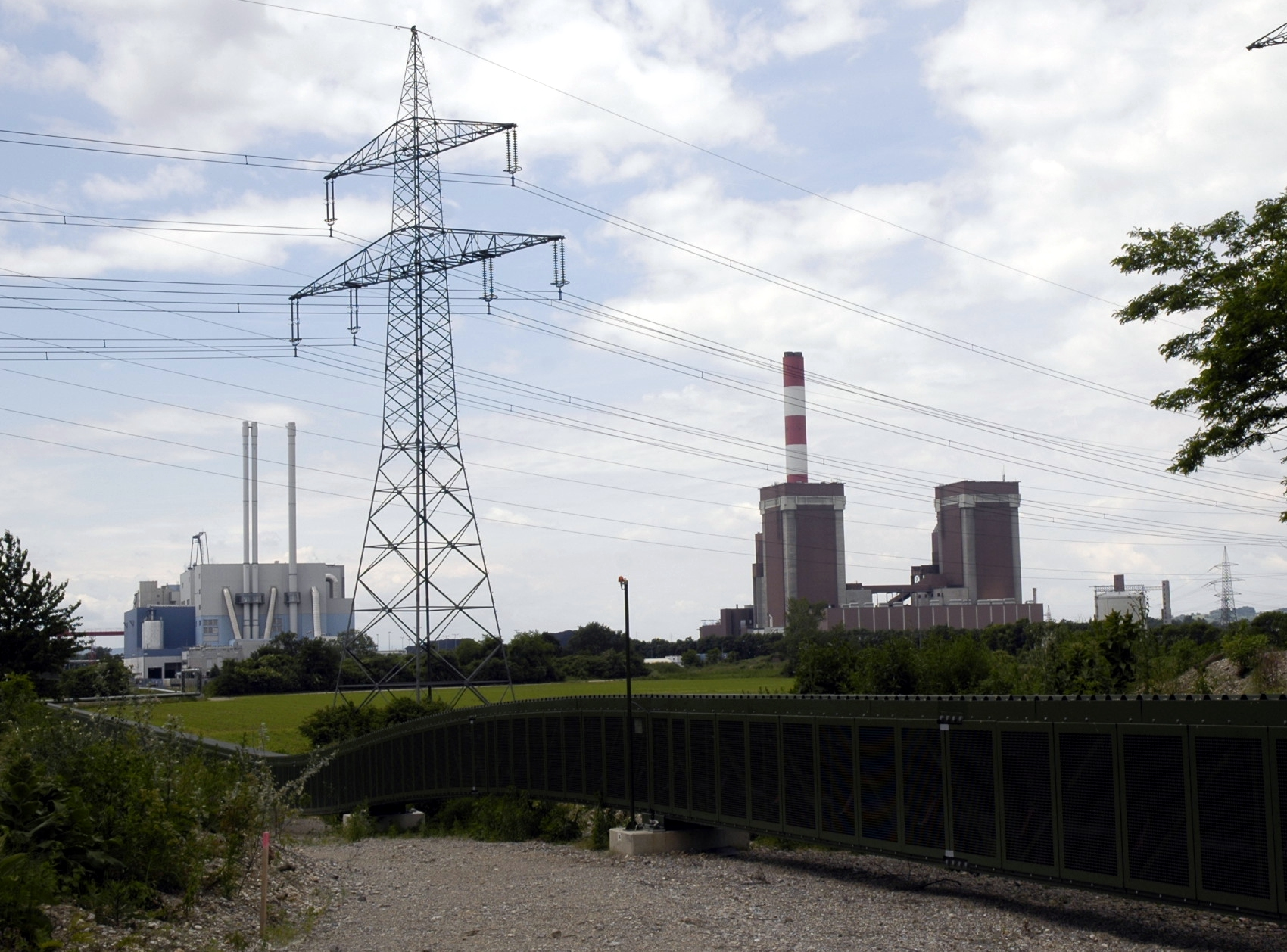 Kraftwerk Dürnrohr: Links hinten die thermische Abfallverwertungsanlage der EVN, rechts die Kohleblöcke der EVN und der Verbund und vorne der Rohrgurtförderer